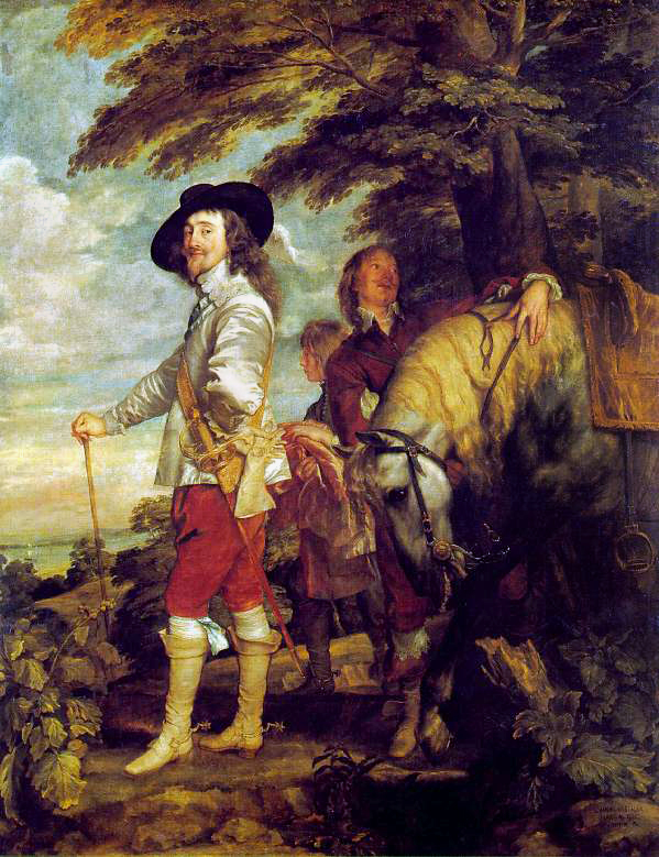 Charles Ier, roi d'Angleterre (1600-1649), dit Portrait du roi à la chasse